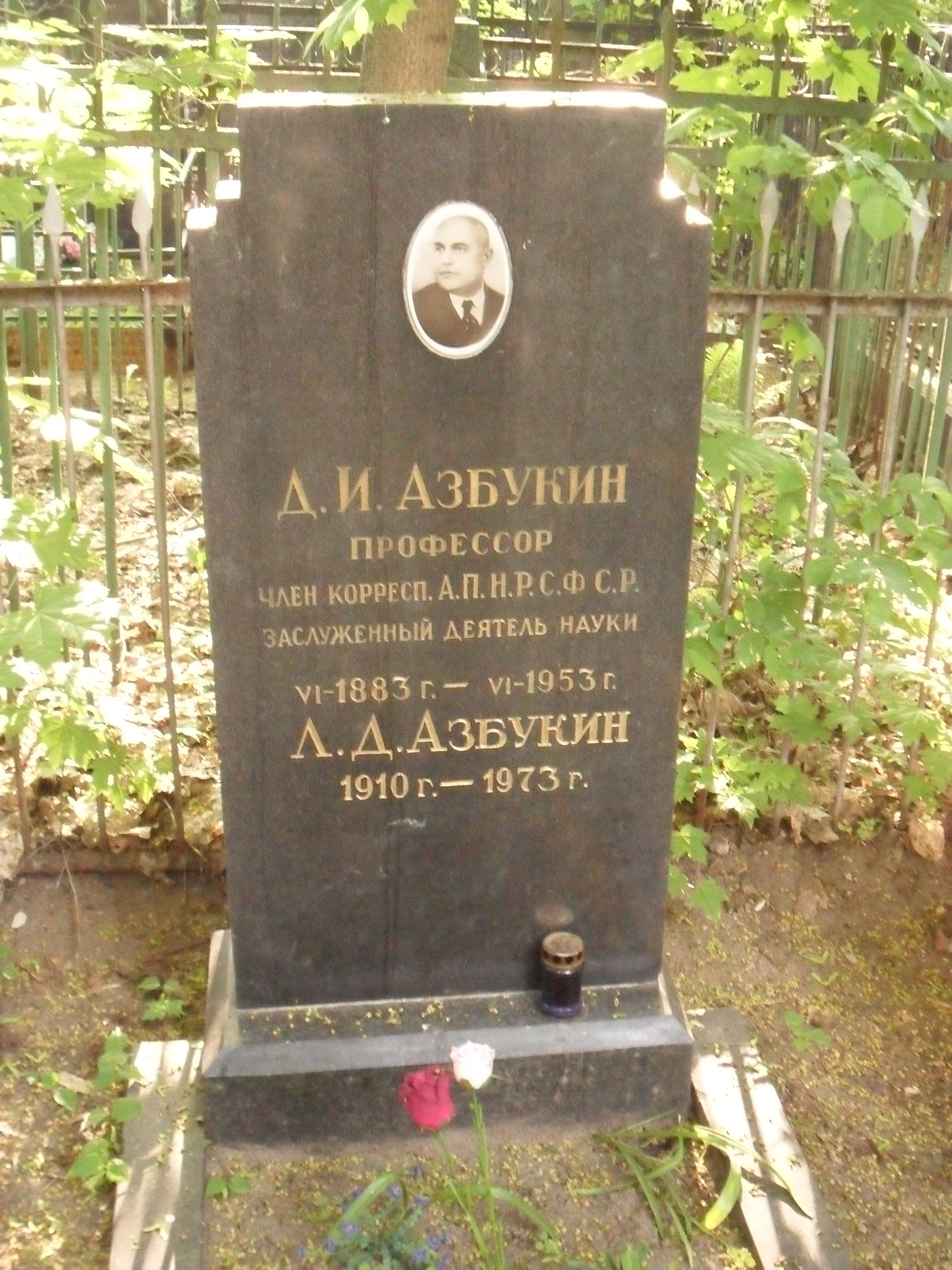 Могила заслуженного деятеля науки РСФСР, профессора Дмитрия Азбукина на Ваганьковском кладбище.